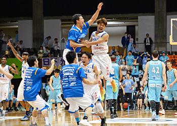 滋賀レイクスターズロゴ